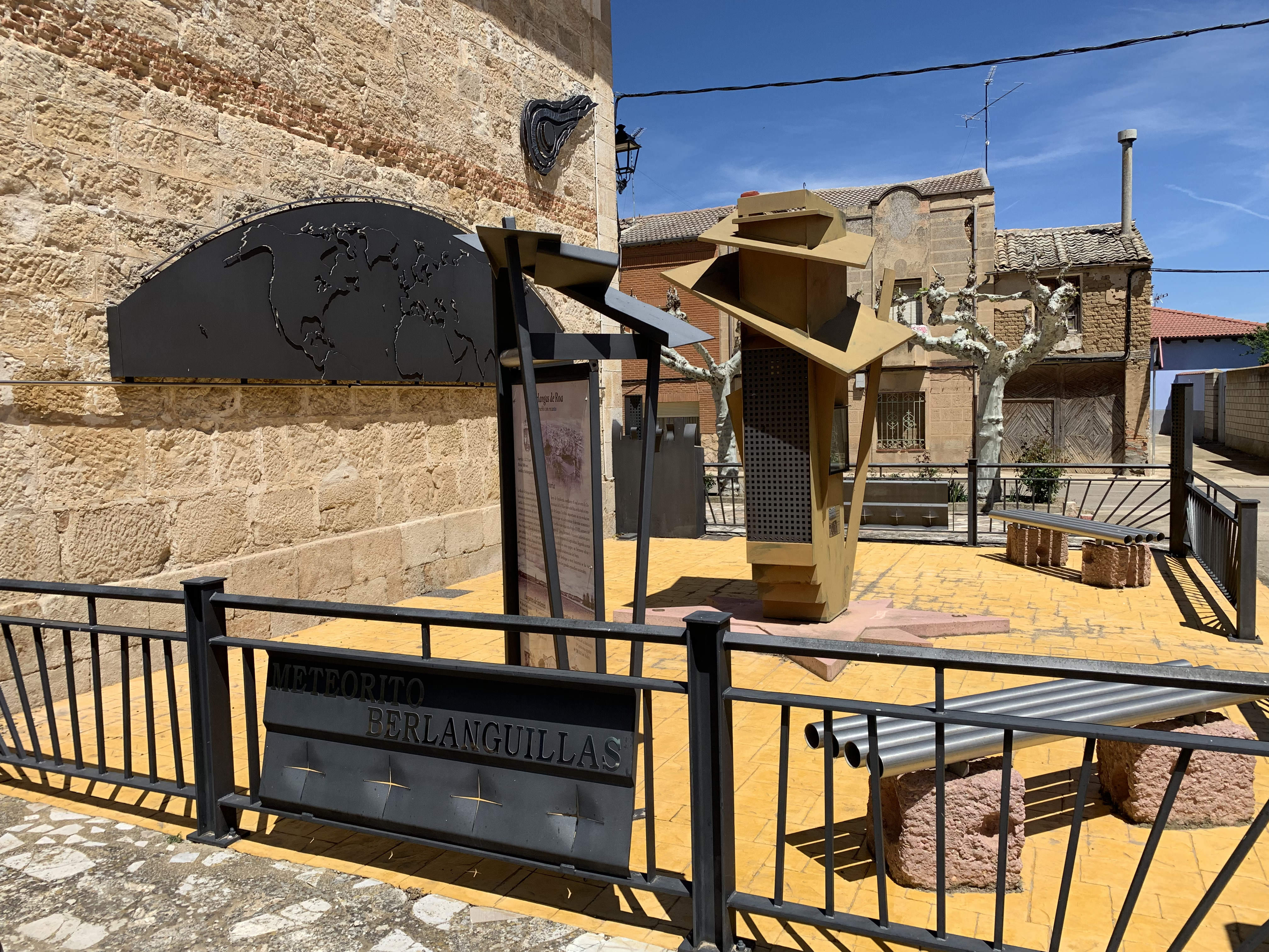 Monumento al Meteorito de Berlanguillas